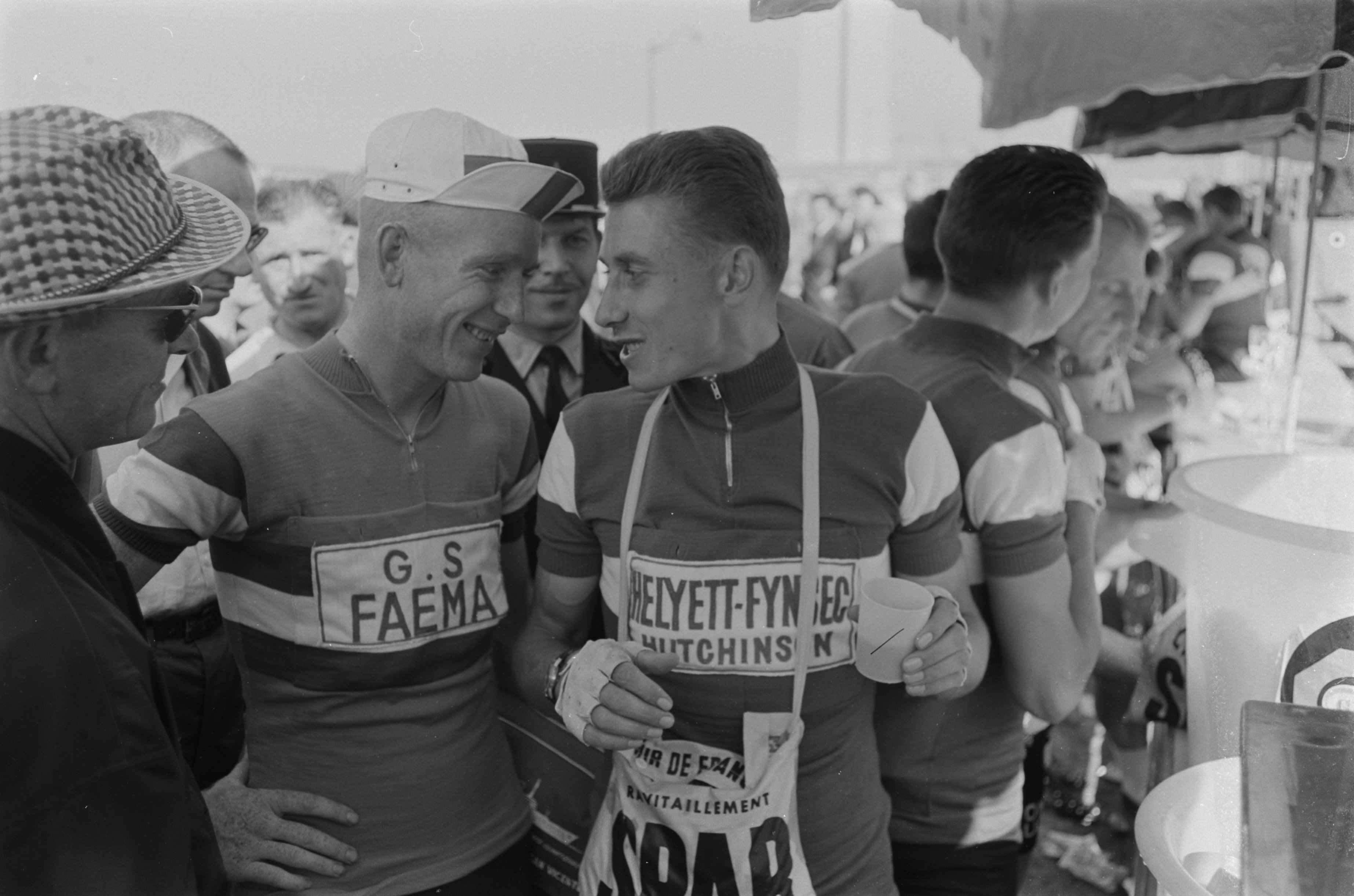 Charlie Gaul, Ab Geldermans bij het menubord, Piet van Est in gesprek met Anquetil.